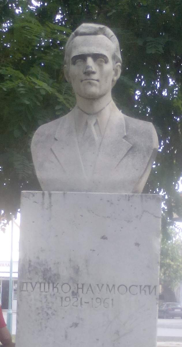 Биста на Душко Наумоски во Прилeп